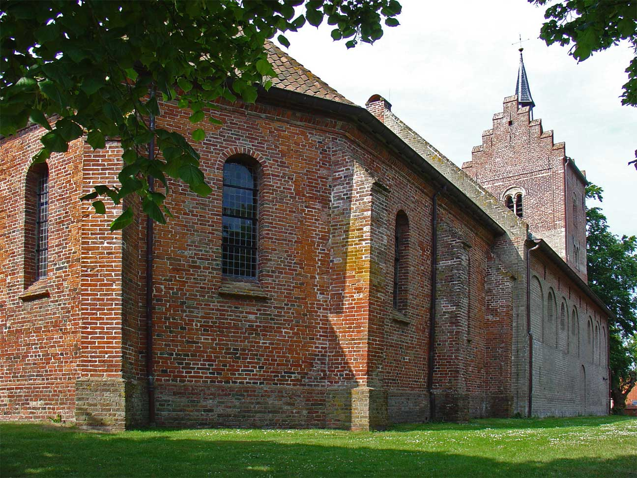 De Magnuskerk te Anloo